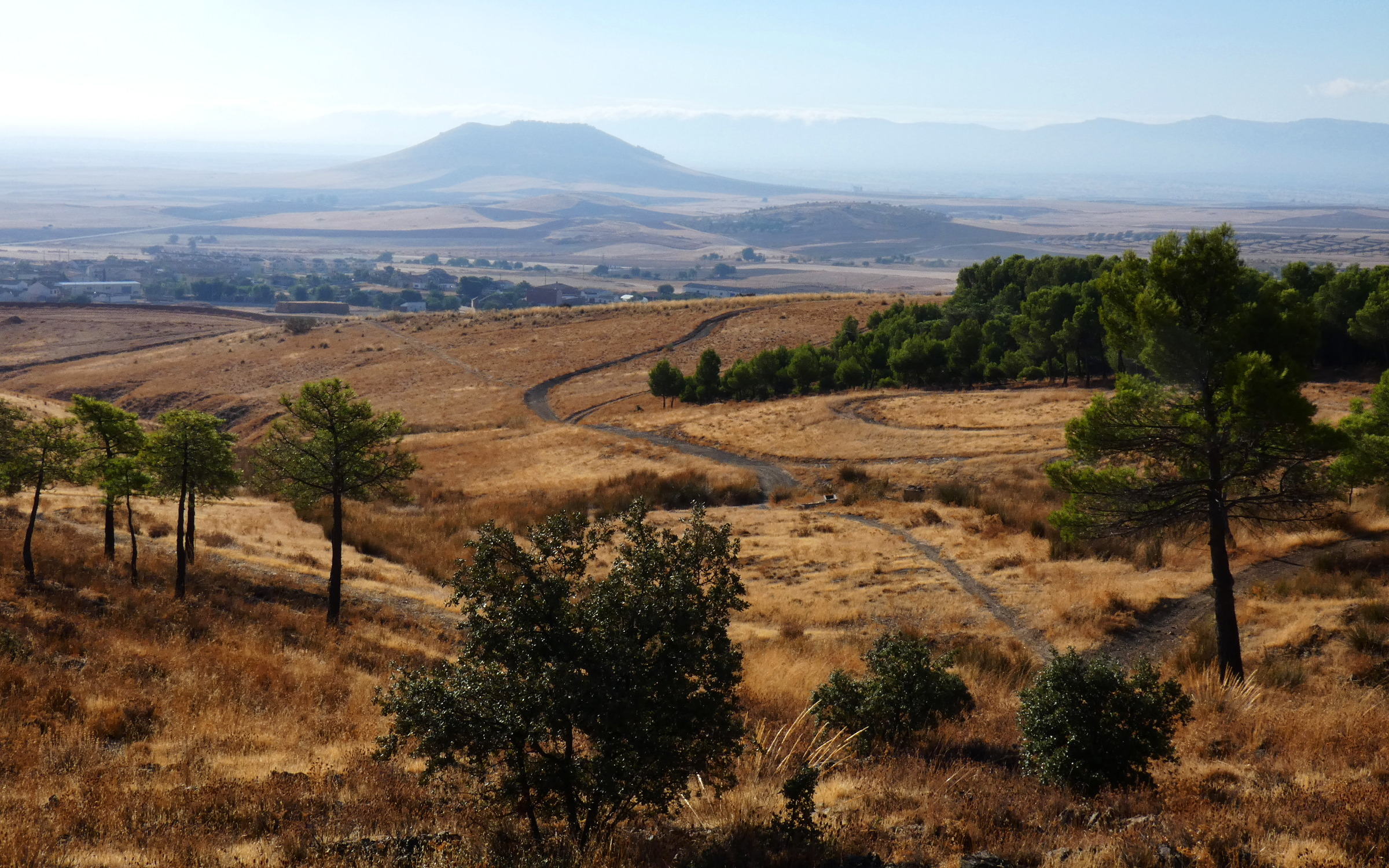 Al sur de la ciudad de Toledo se extiende una llanura que acaba en los Montes de Toledo. En medio de esta llanura destacan varios montes isla, pequeñas sierras de formas redondeadas. La foto está hecha desde la Sierra de Noez; al fondo destaca la Sierra de Layos.